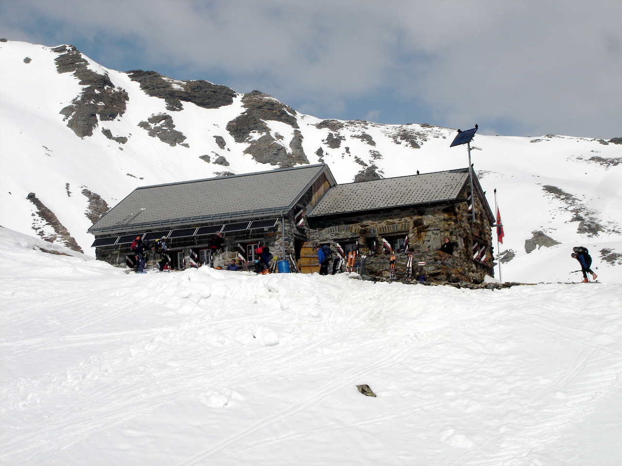 Fridolinshütte (2111 m) im April 2006